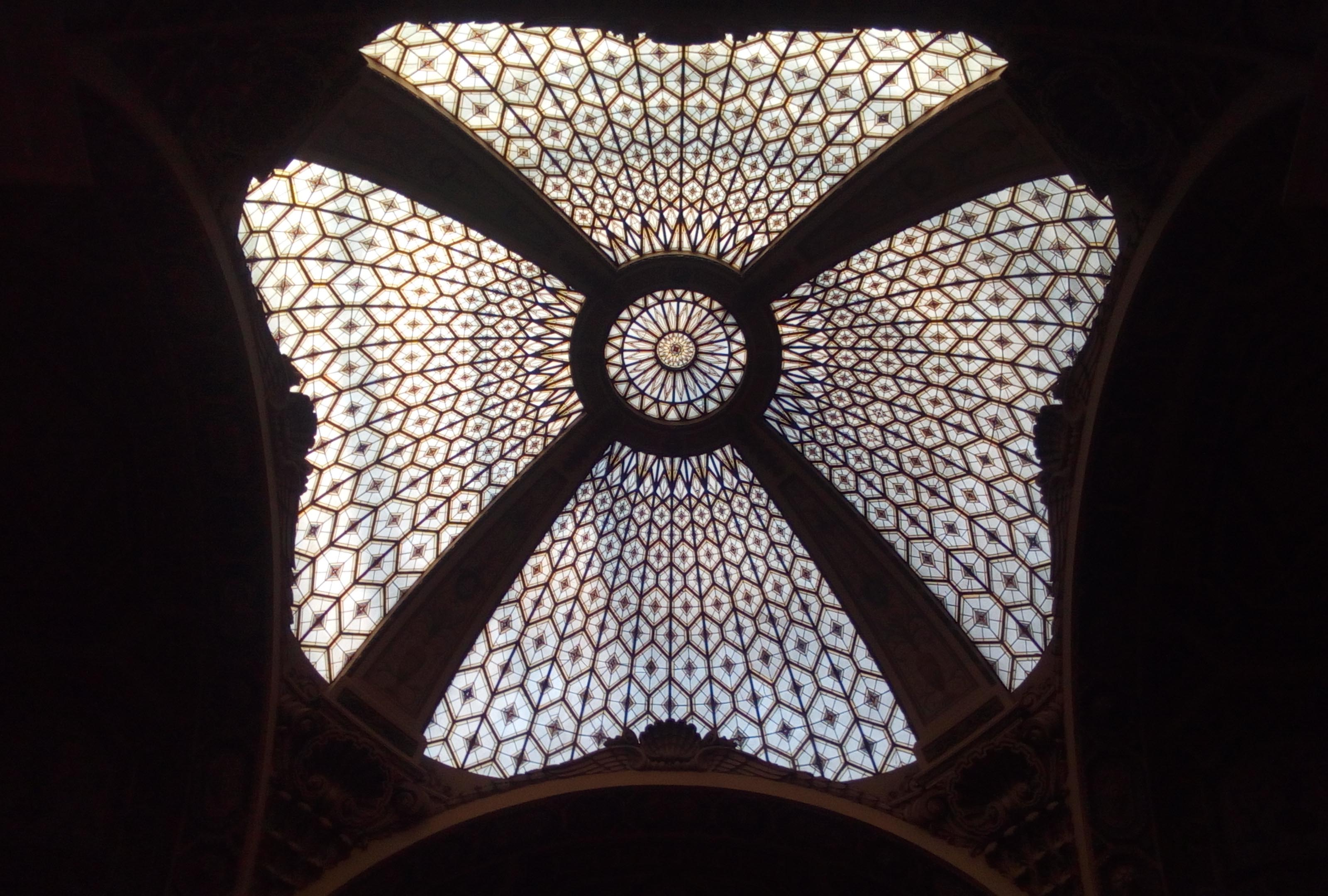 Cúpula del edificio de Correos.